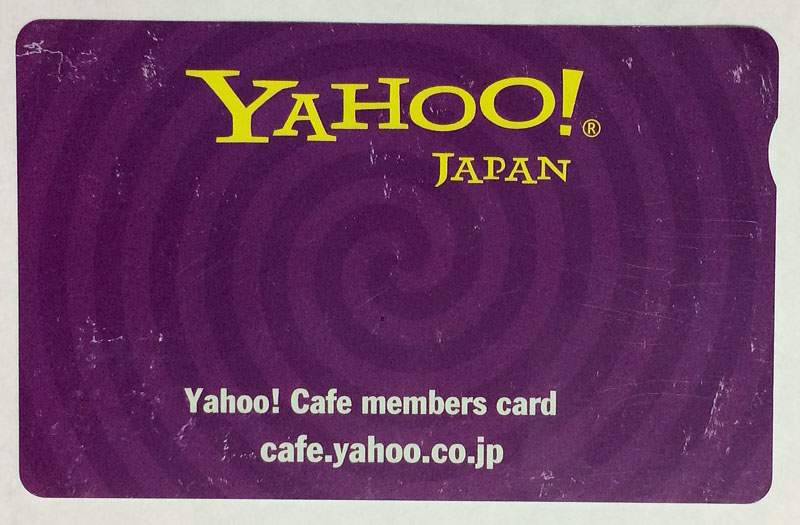 ヤフーカフェが当初会員制だった頃の会員カード 写真のカードは2002年発行の物